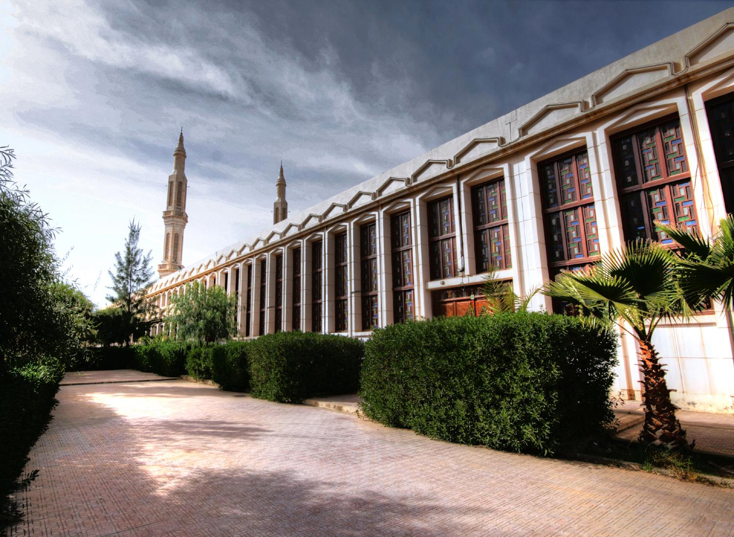 Mosquée 1er Novembre de Batna en Algerie